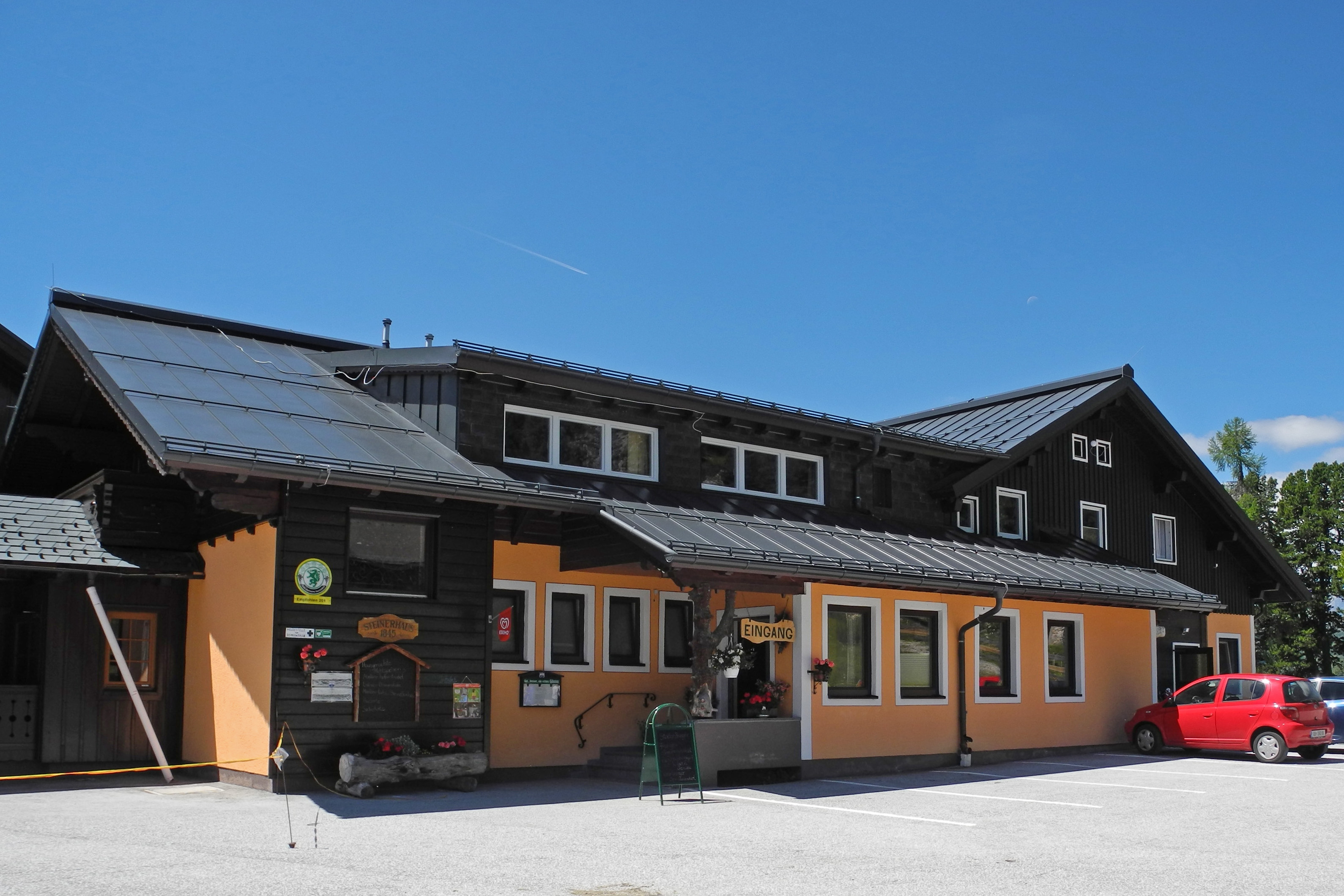 Steinerhaus (1845 m) am Stoderzinken bei Gröbming